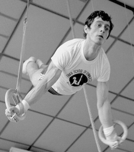 Dănuț Grecu in Bucharest